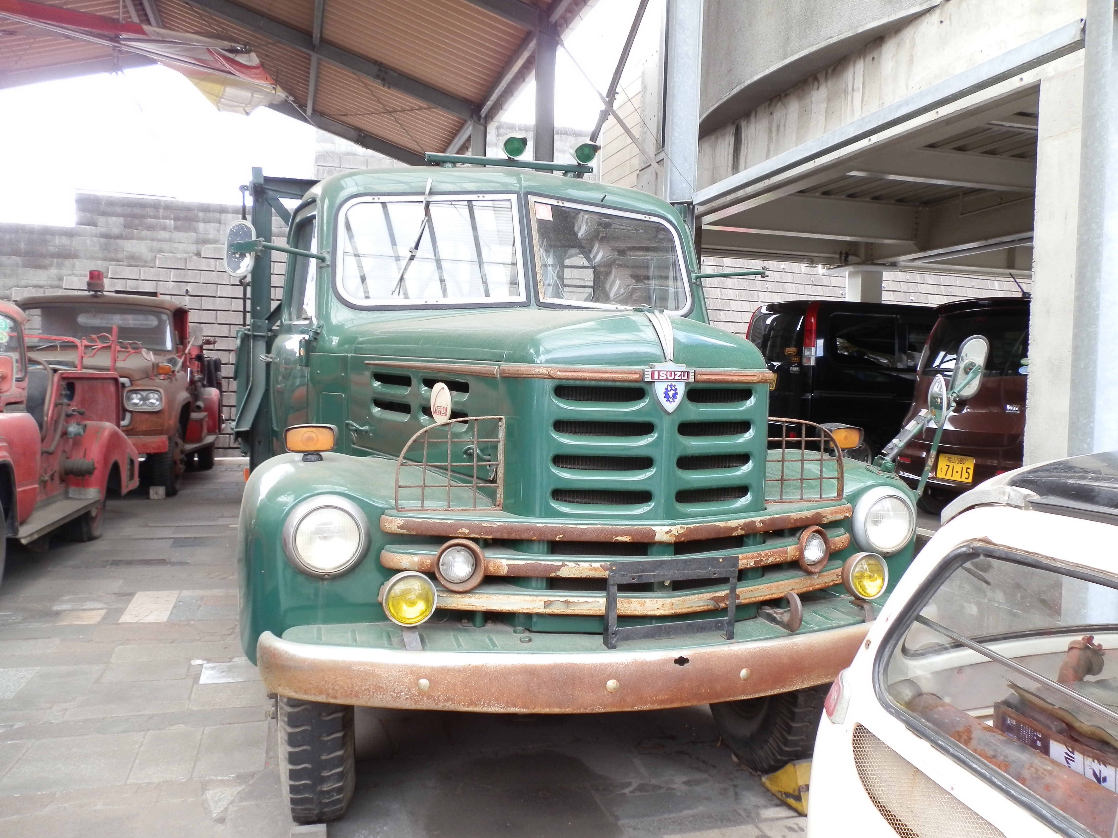 福山自動車時計博物館で保存されているTX。